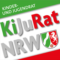 Logo des Kinder- und Jugendrates NRW